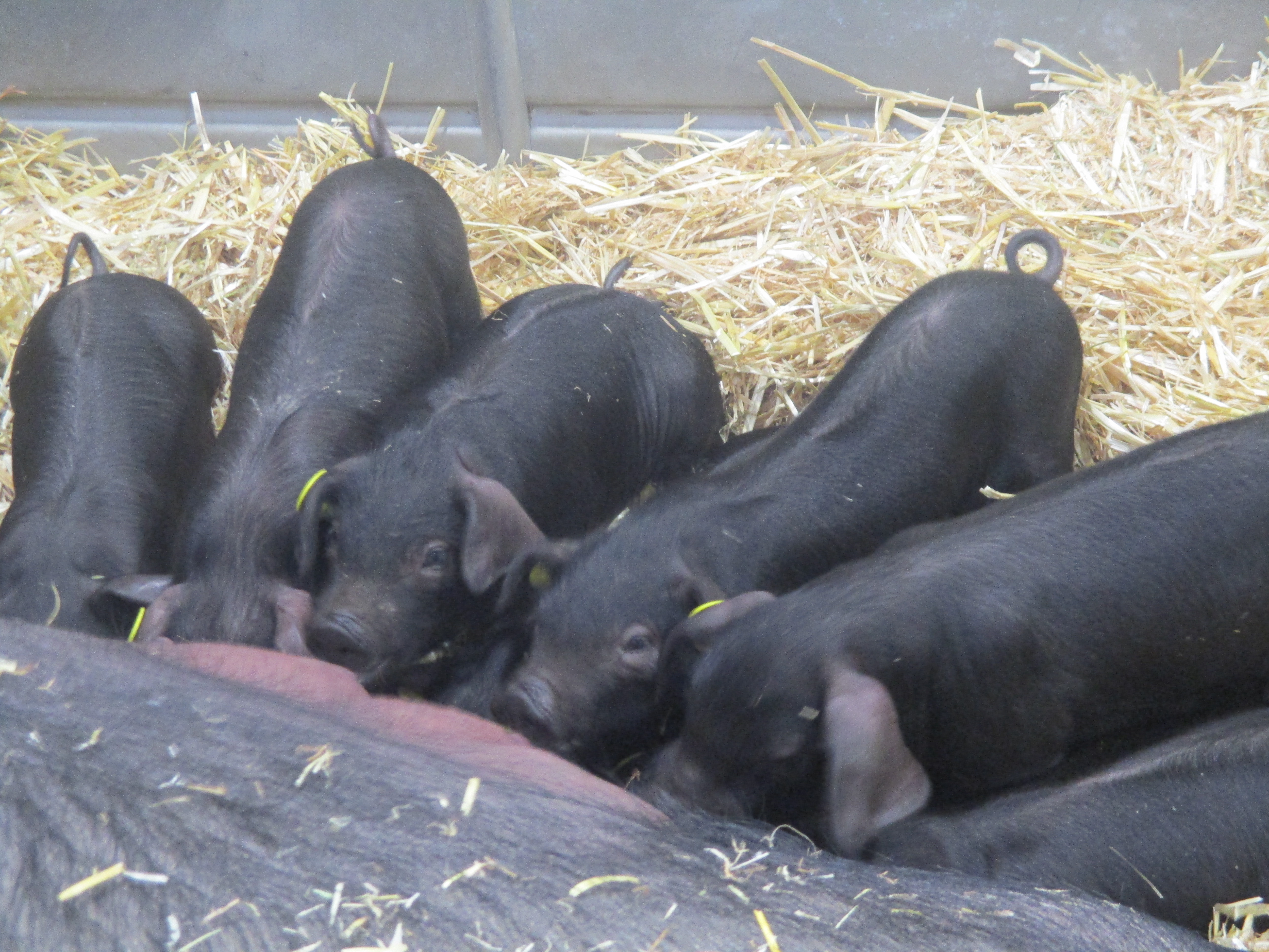 Cochonnets noirs de Bigorre à la tétée.